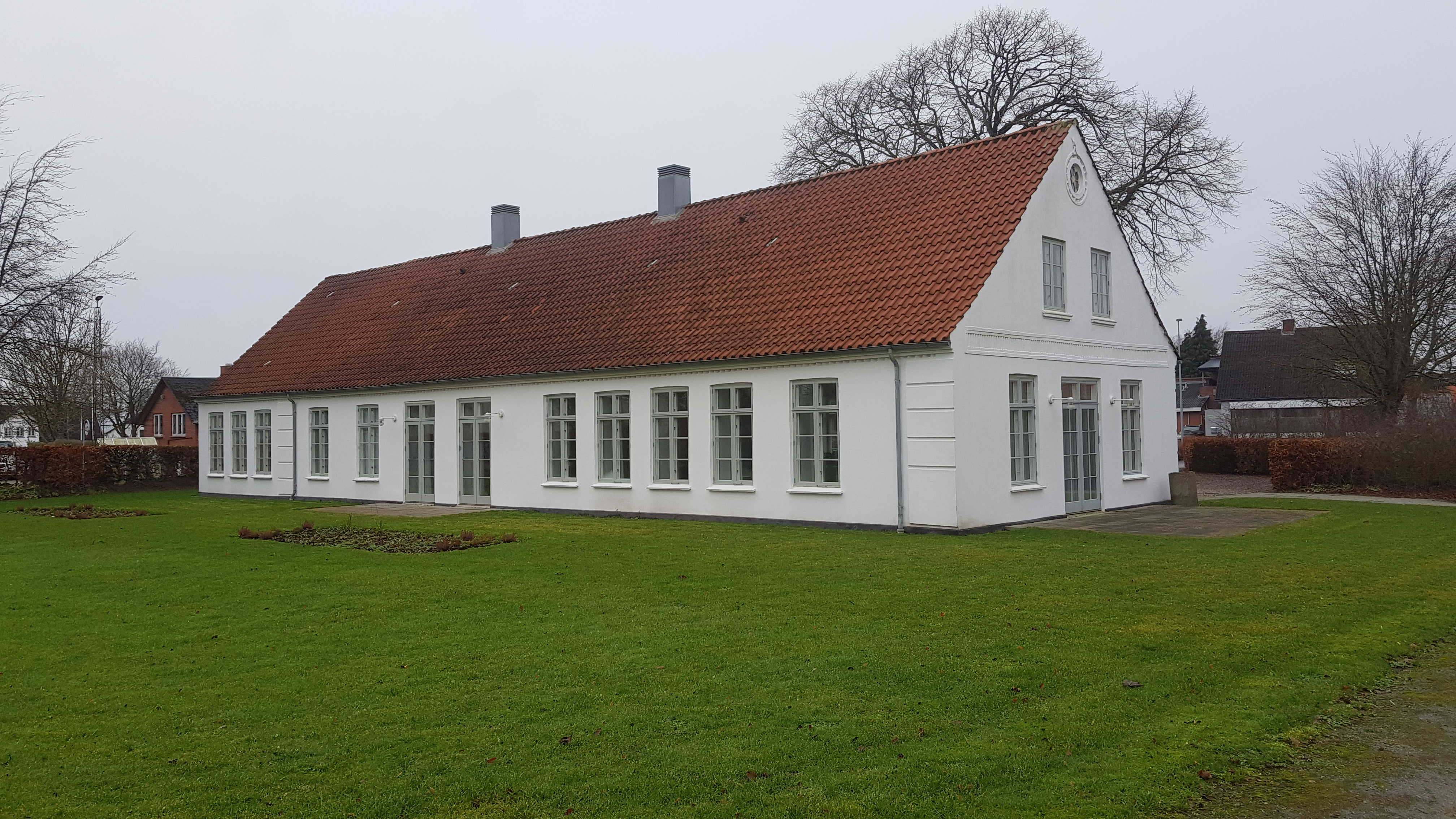 Sognehuset i Skrydstrup (Ribevej 51, Skrydstrup) set fra havesiden